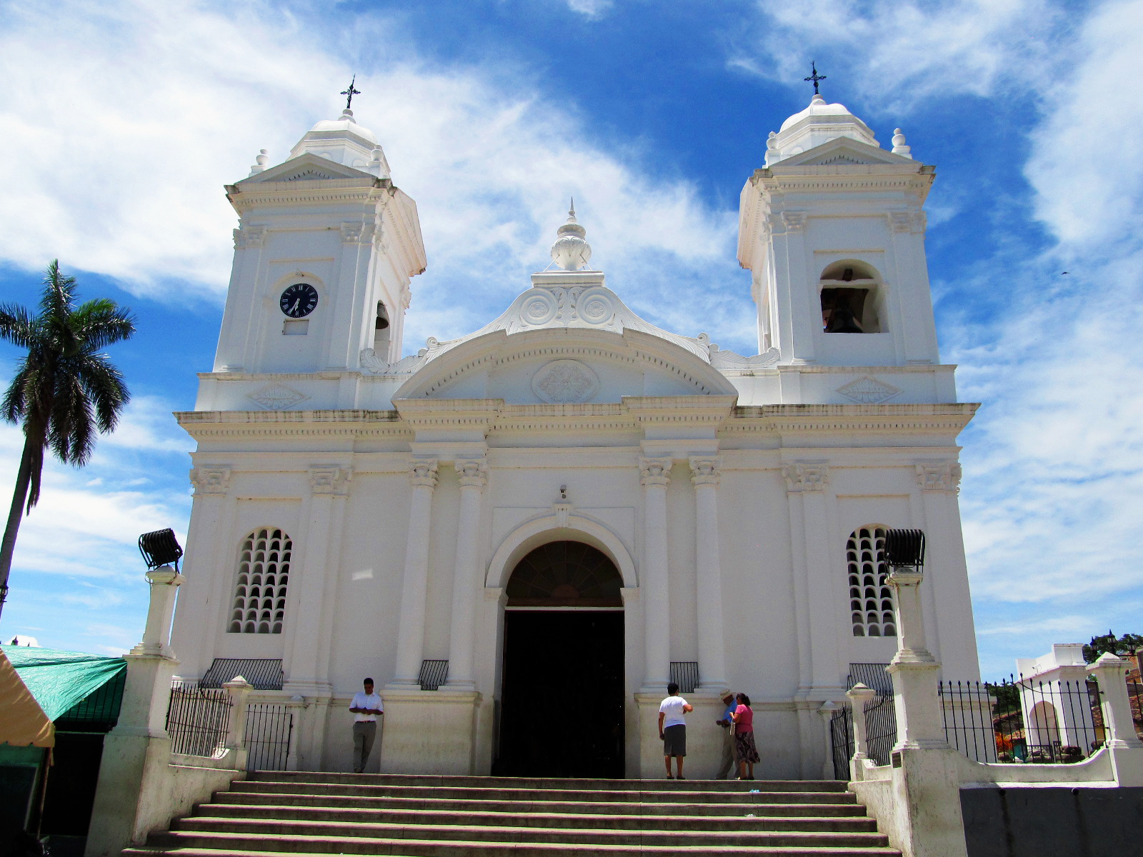 Hermosa Iglesia que data desde 1880 ubicada en el Centro Historico de Ilobasco. Editada levemente en contraste y brillos